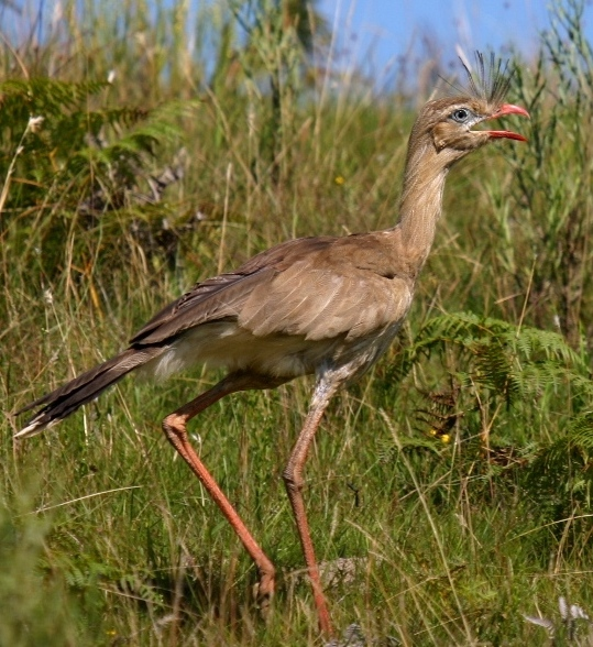 Red-legged Seriema, Lages, Santa Catarina, Brazil